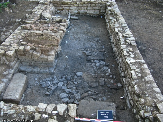 Vue générale de la cuisine d'une villa sub-urbaine des Ier-IIIe s. mise au jour à Grand (Vosges) en 2011.